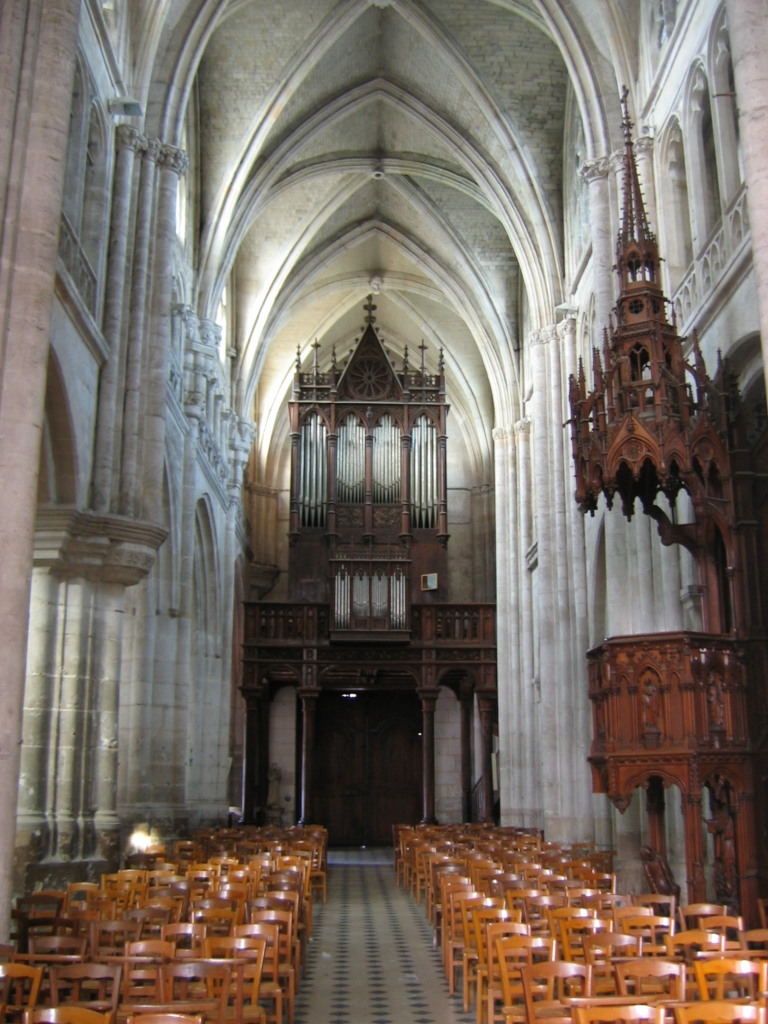 Eglise de Saint-Taurin, nef et orgue, Évreux (Eure)